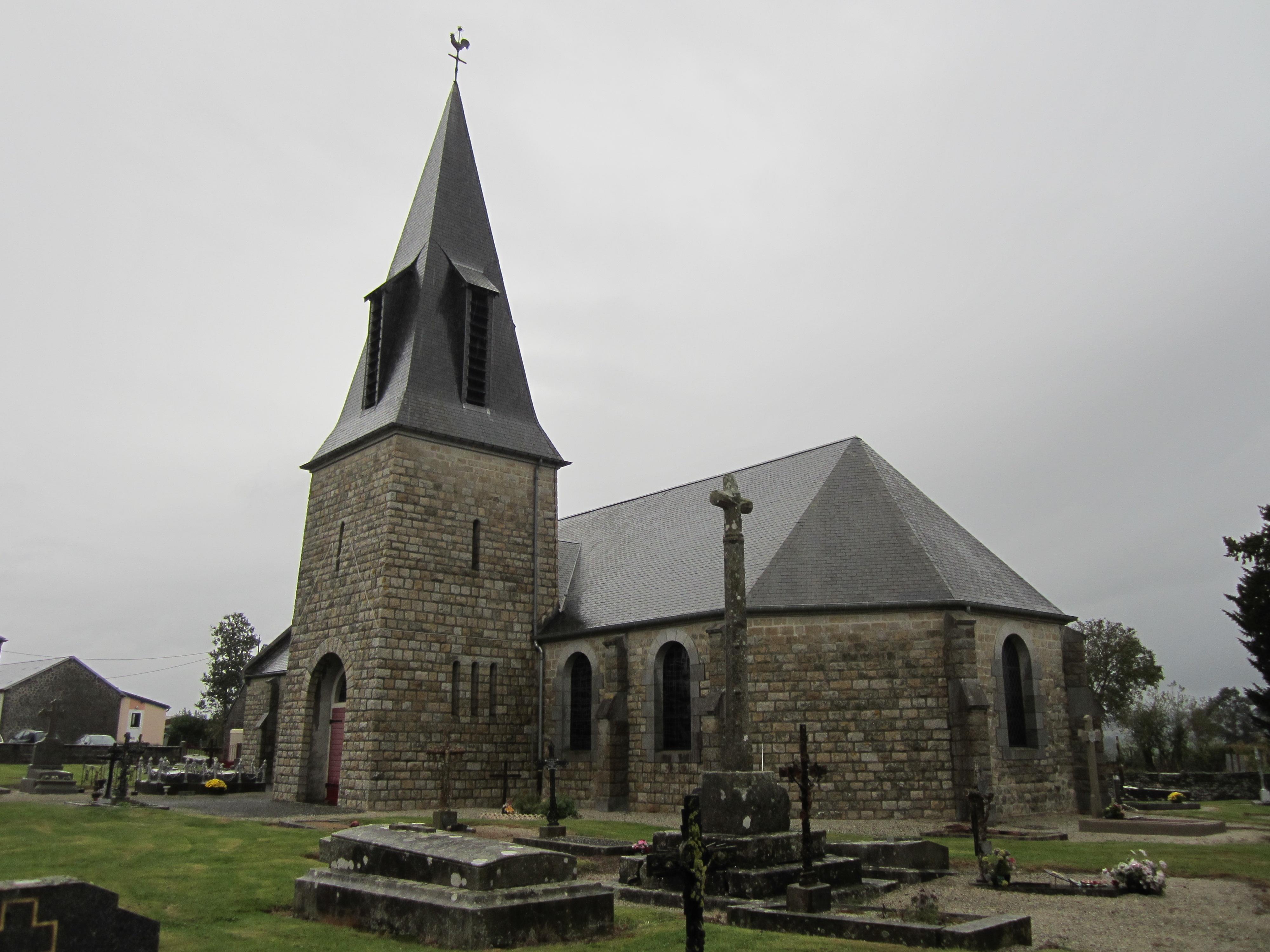 Le Mesnil-Tôve, Manche